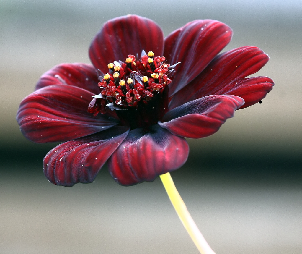 Schokoladen-Kosmee_(Cosmos_atrosanguineus)